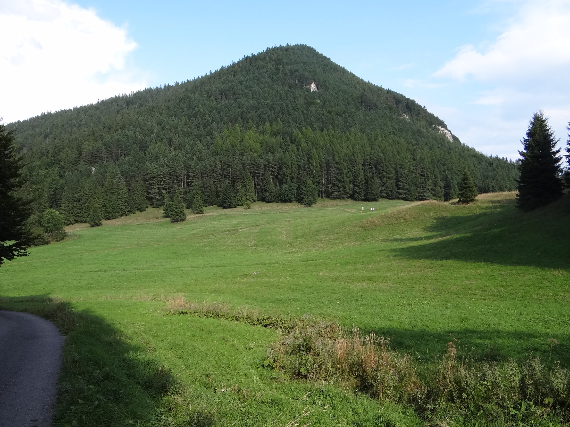 Sidorovo